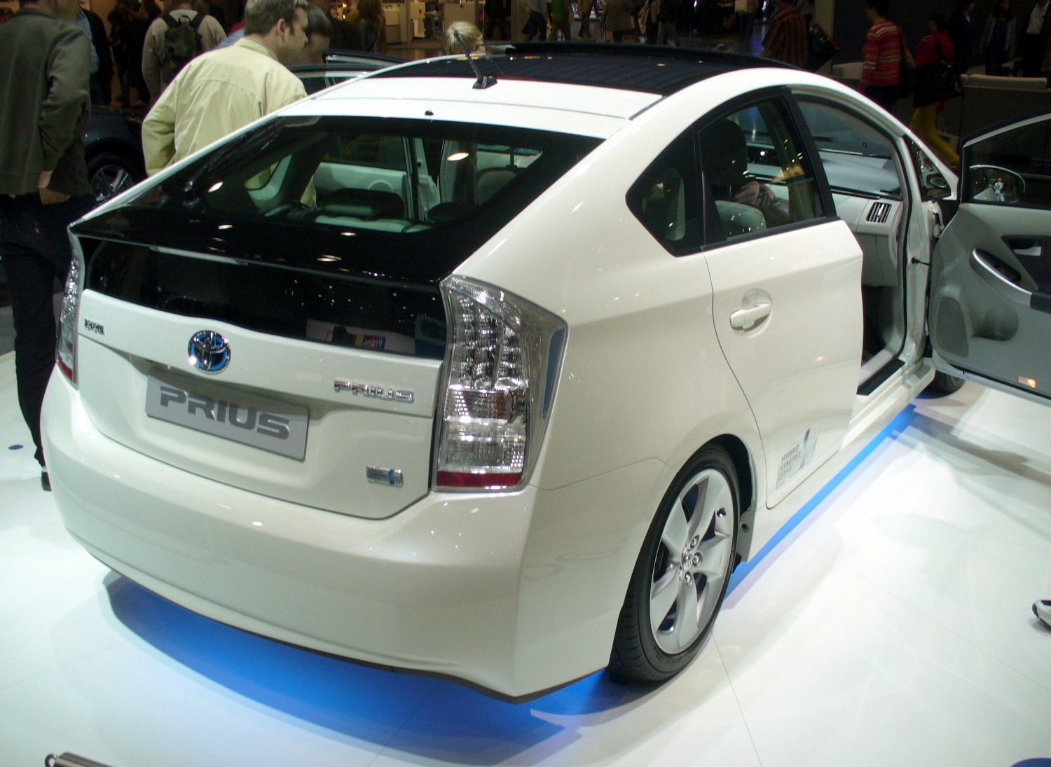 Toyoa Prius III